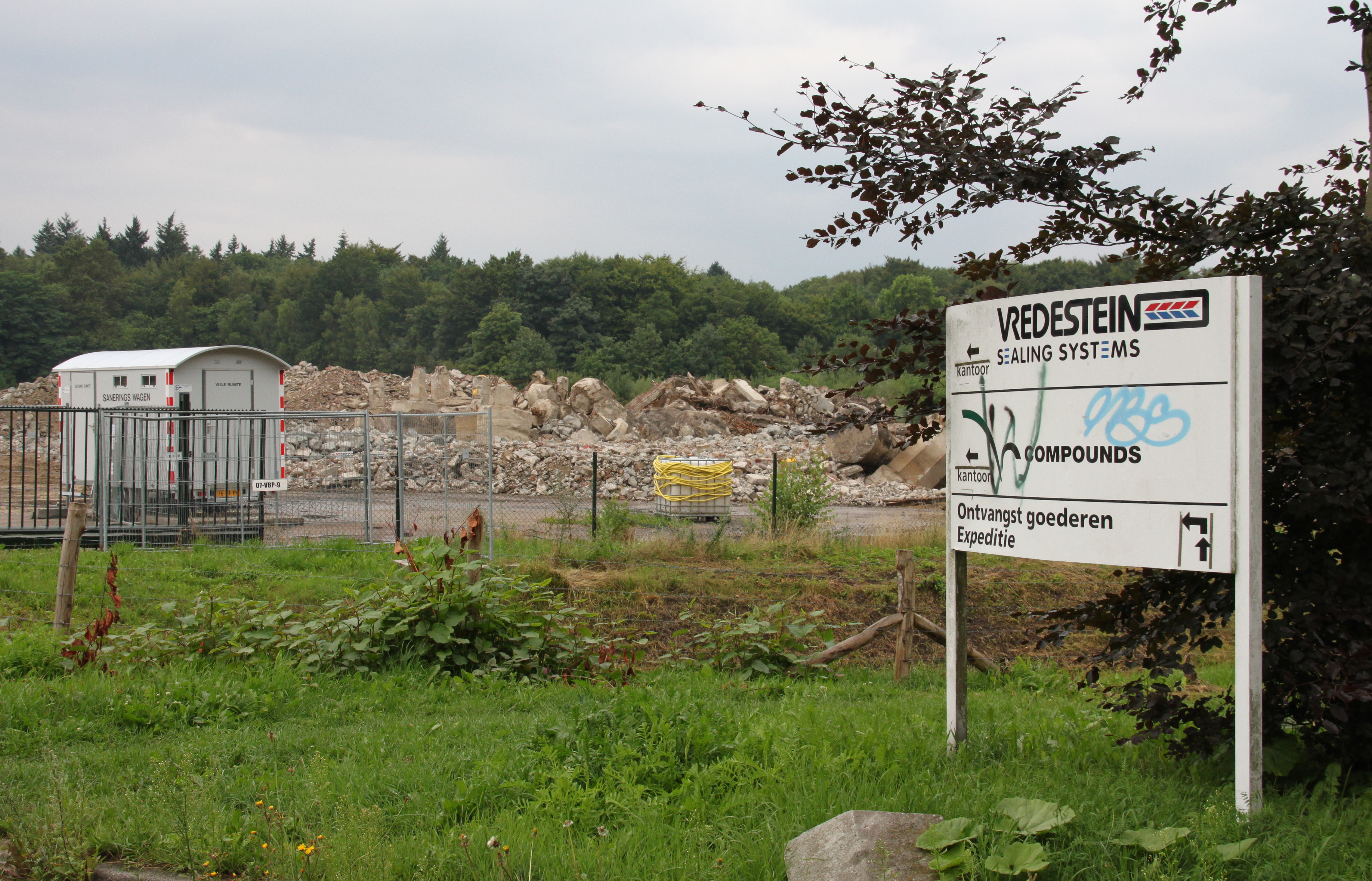 Project Renkums Beekdal, waar een oud industrieterrein is afgebroken en de bestemming "natuur" heeft teruggekregen.